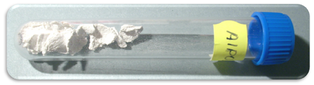 Fosforečnan hlinitý - AlPO4